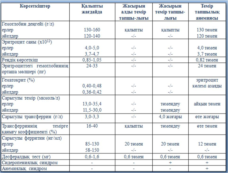 Темір тапшылық кезеңдерінің ажыратпалы диагнозы